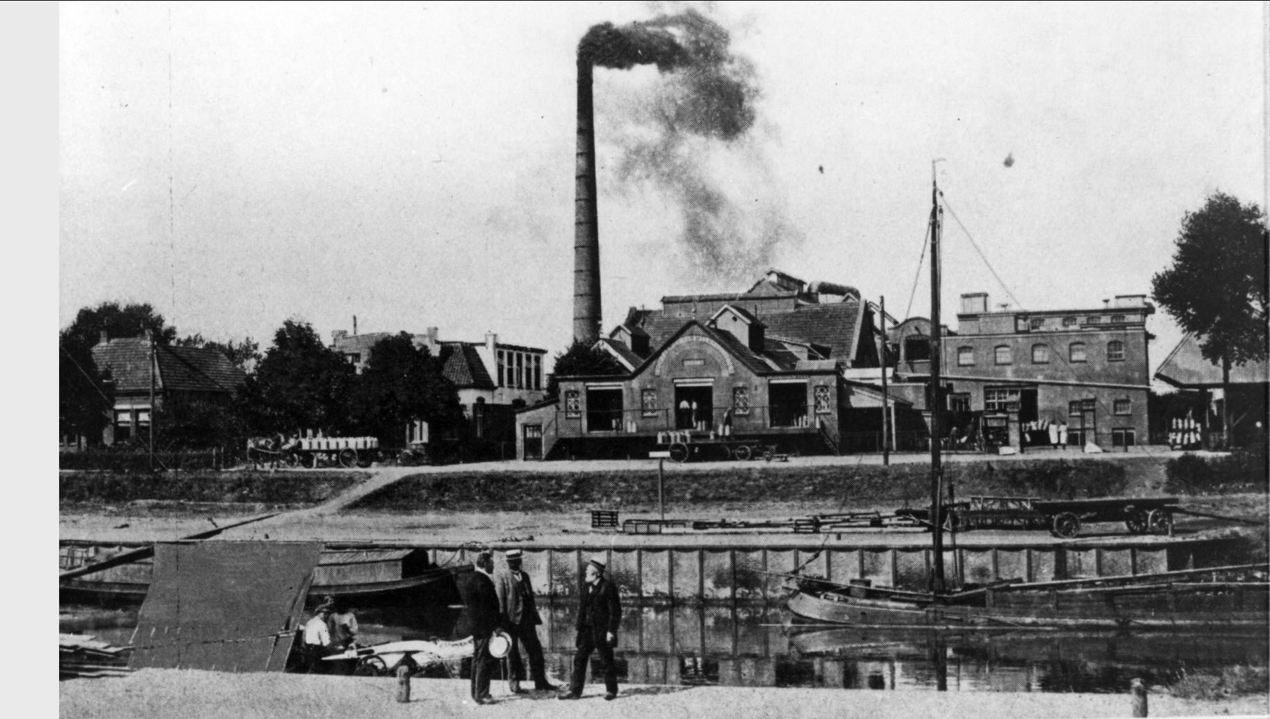 Vroegere haven van Roden met de zuivelfabriek